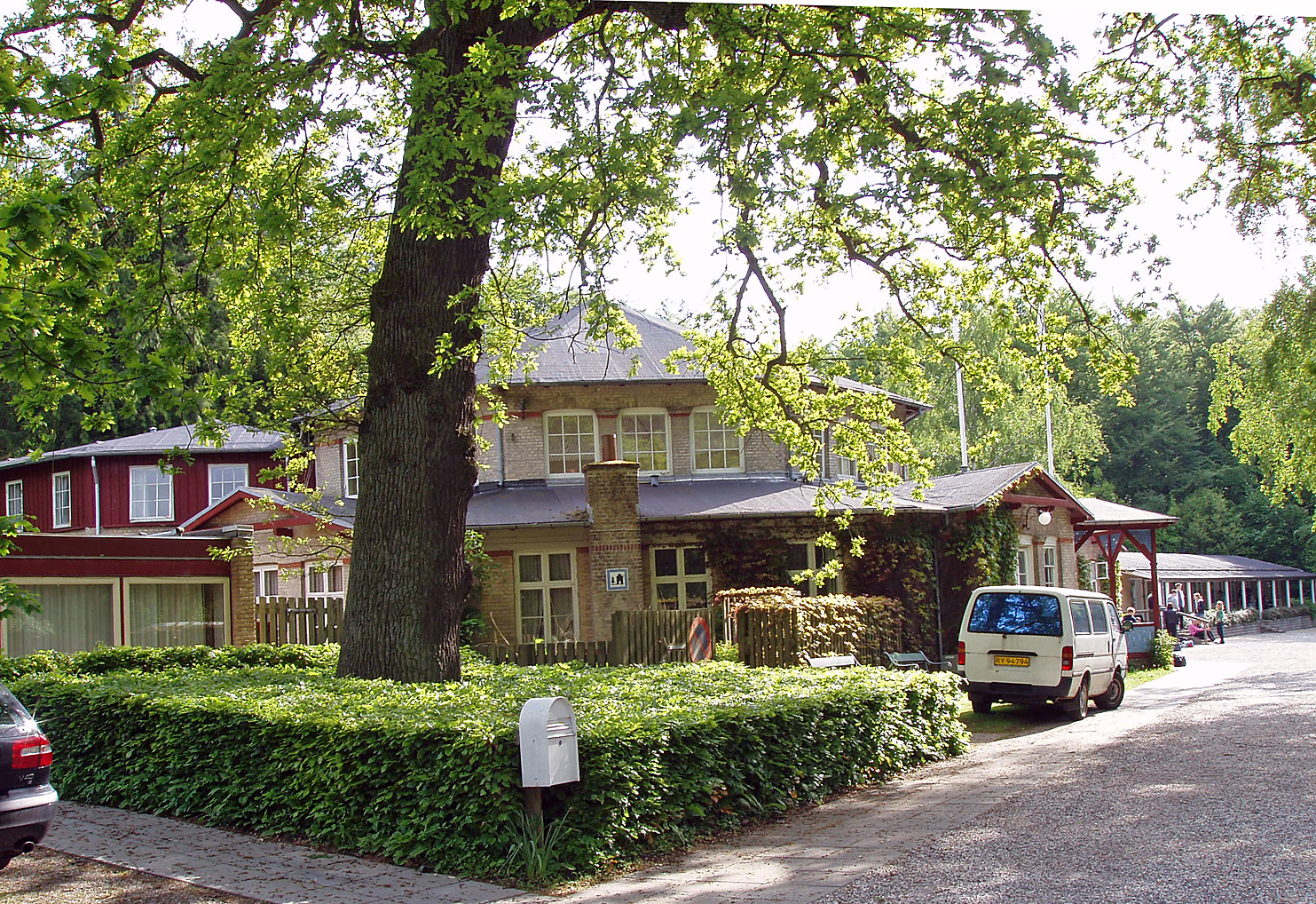 Pavillionen i Riis Skov, Århus der nu er vandrehjem